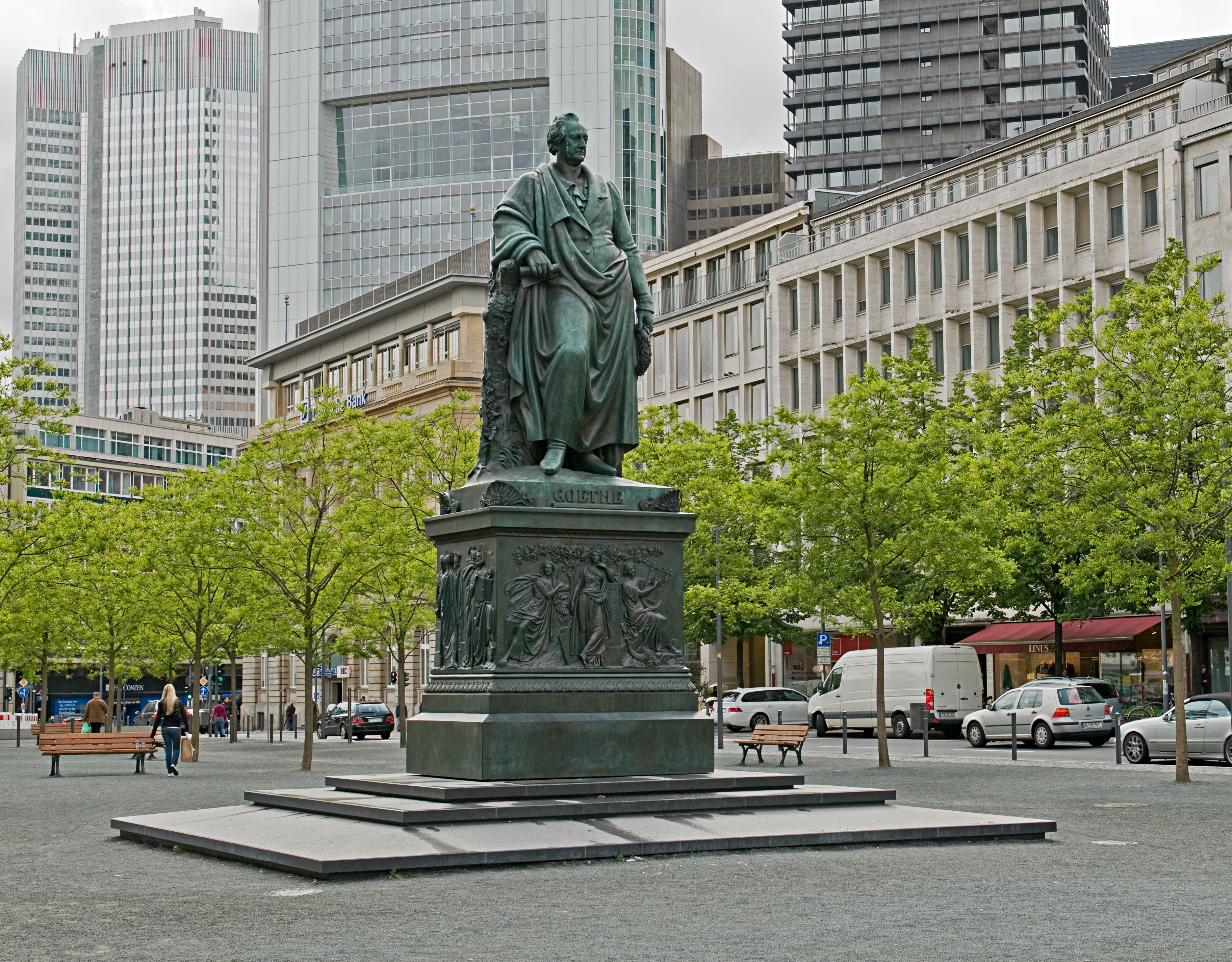 Goethedenkmal von Ludwig Schwanthaler auf dem Goetheplatz, Frankfurt am Main